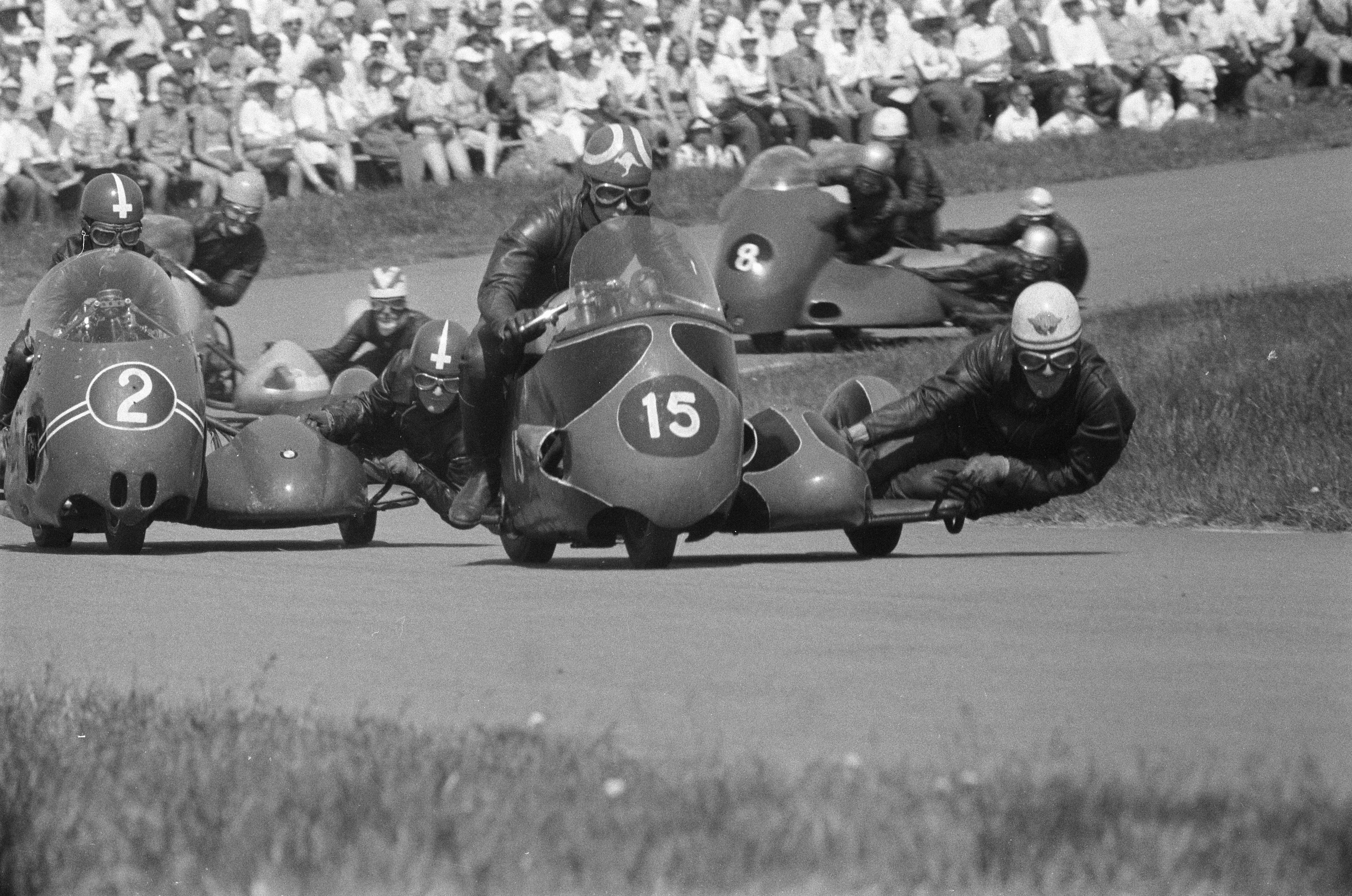 Collectie / Archief : Fotocollectie Anefo Reportage / Serie : TT Assen 1960 Beschrijving : Zijspanrace Datum : 26 juni 1960 Locatie : Assen Trefwoorden : motorsport Instellingsnaam : TT Fotograaf : Bilsen, Joop van / Anefo Auteursrechthebbende : Nationaal Archief Materiaalsoort : Negatief (zwart/wit) Nummer archiefinventaris : bekijk toegang 2.24.01.05 Bestanddeelnummer : 911-3664